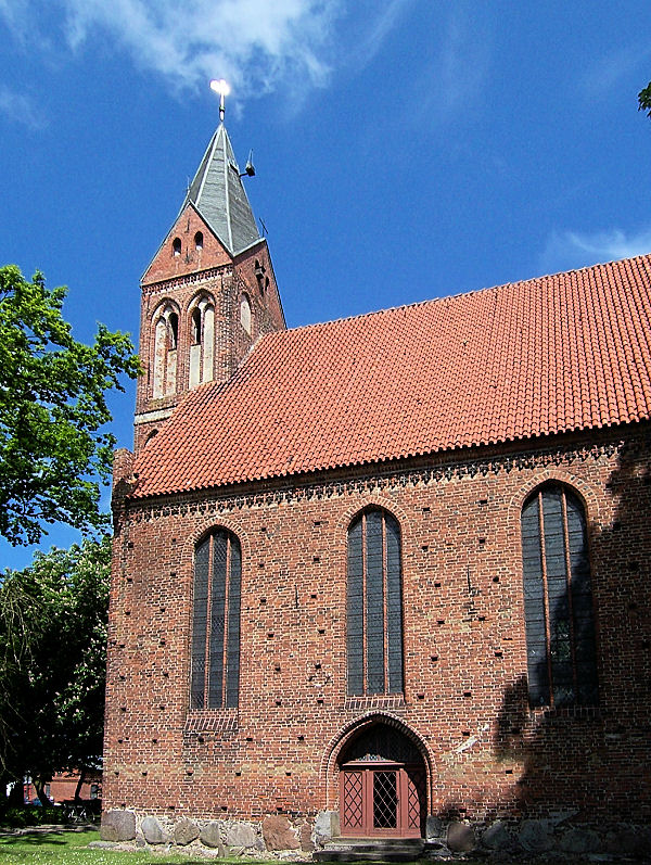 Kirche in Kenz, Mecklenburg-Vorpommern